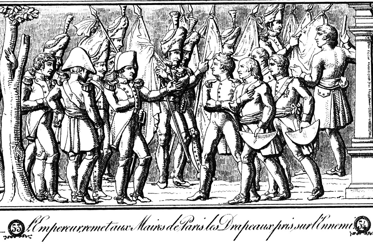 Gravure du bas-relief n°53 de la colonne de la Grande Armée, représentant la députation des maires de Paris en 1805 à Schönbrunn, auprès de Napoléon.